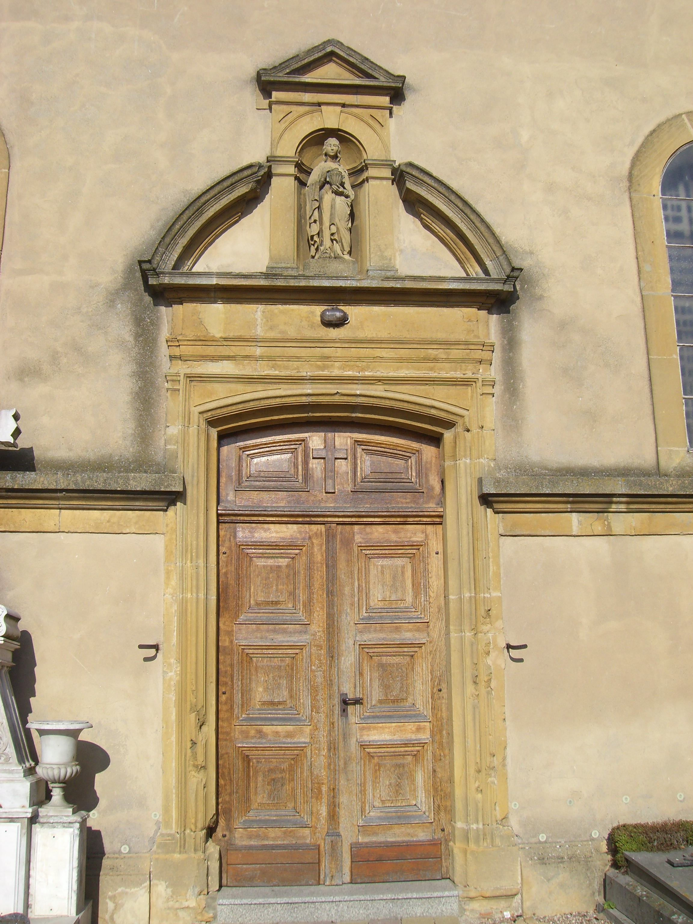 Porte d'entrée de l'église